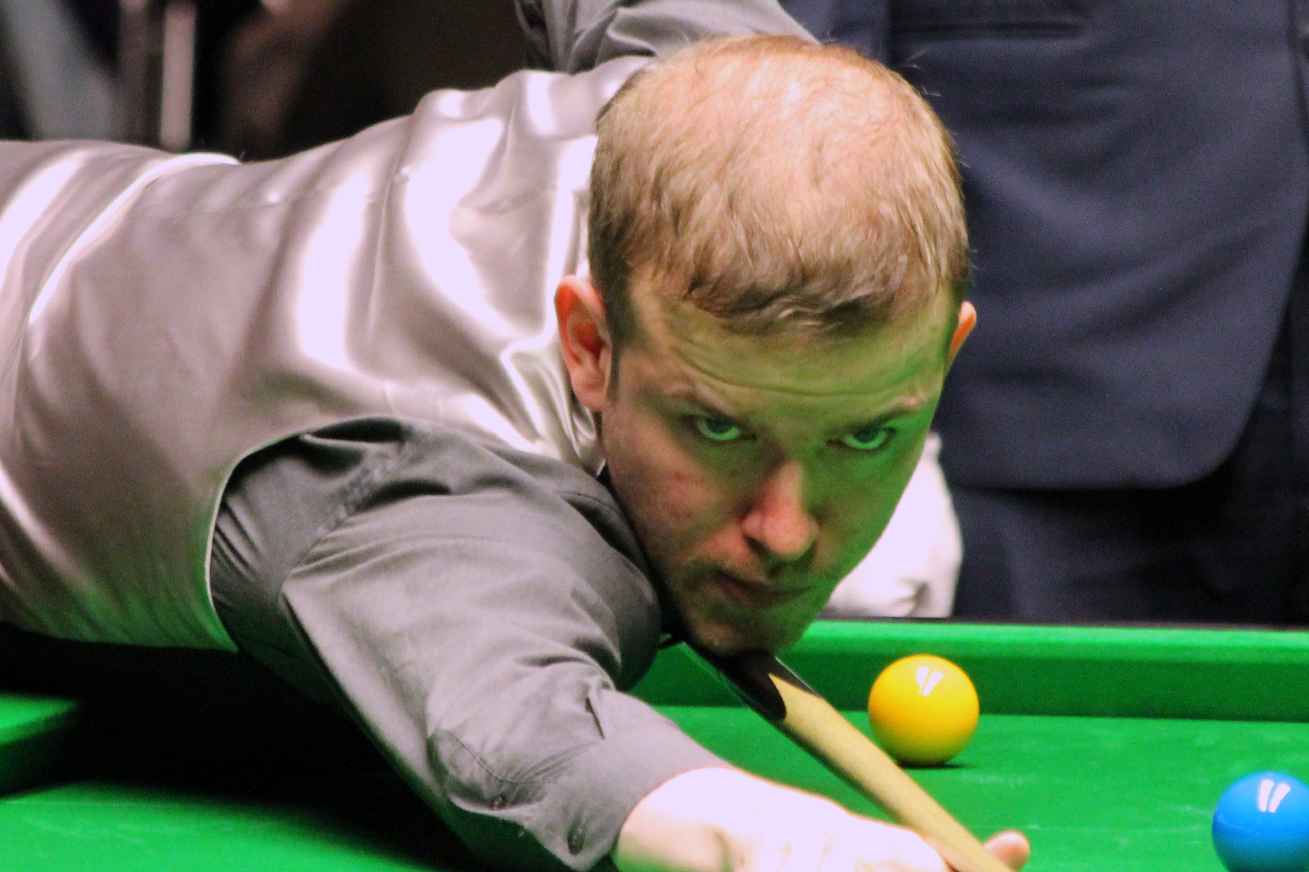 der englische Snookerspieler Robbie Williams beim Paul Hunter Classic 2012